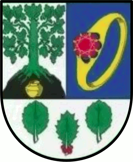 Coat of arms Vorwerk (Niedersachsen), Wappen der Gemeinde Vorwerk